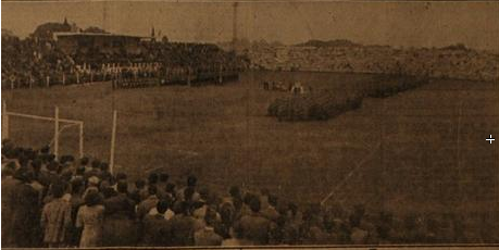 Estadio de Unión de Santa Fe en 1944